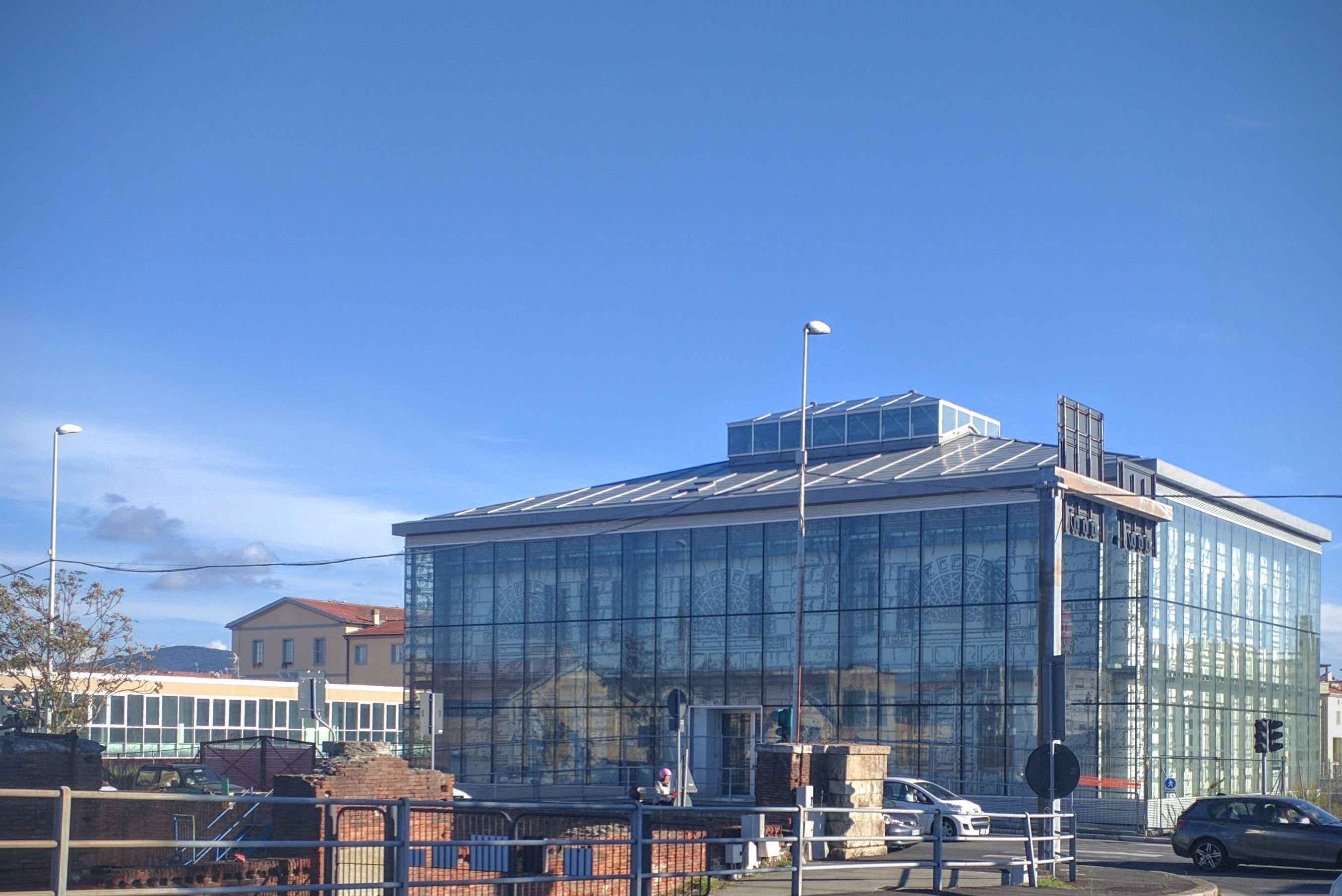 dogana d'acqua